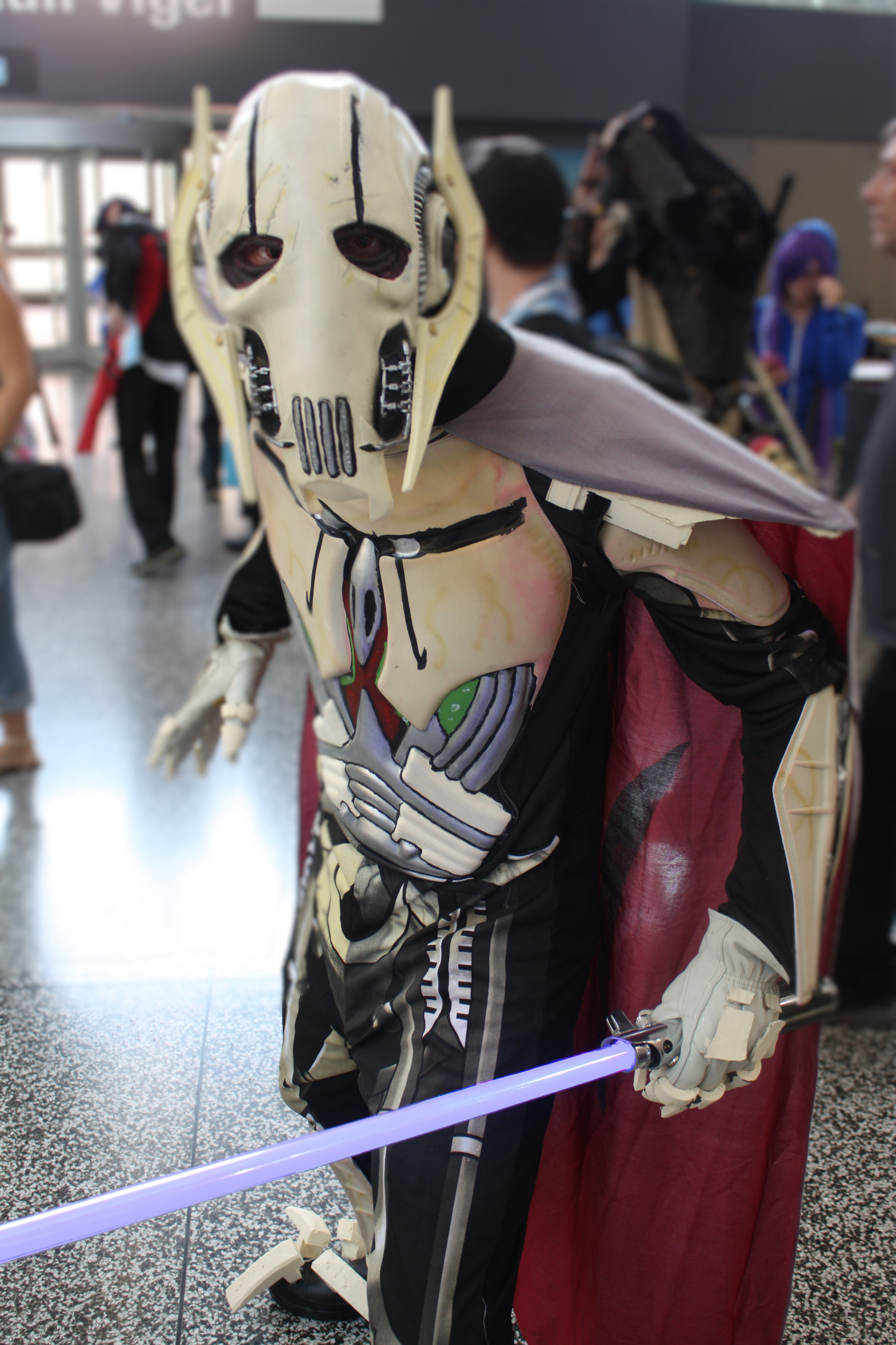 Otakuthon 2014: Grievous